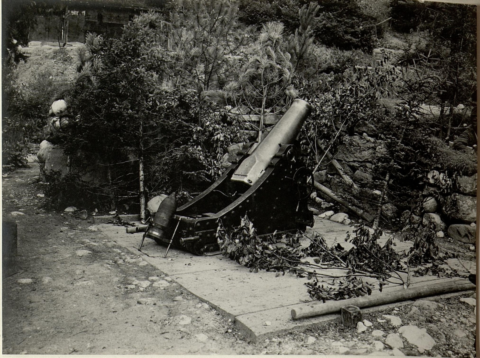 15 cm Nörser. Aufgenommen am 4. Juni 1916.